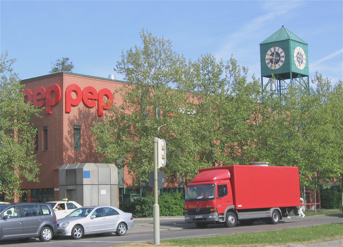 Einkaufs-Center Neuperlach pep, Thomas-Dehler-Str. München